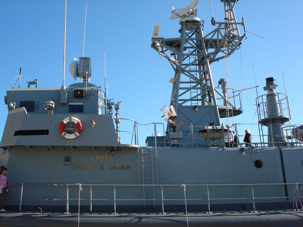 RTOP-12 Kralj Dmitar Zvonimir